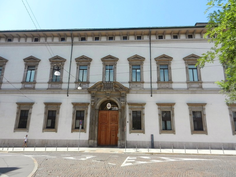 Milano - Arcivescovado